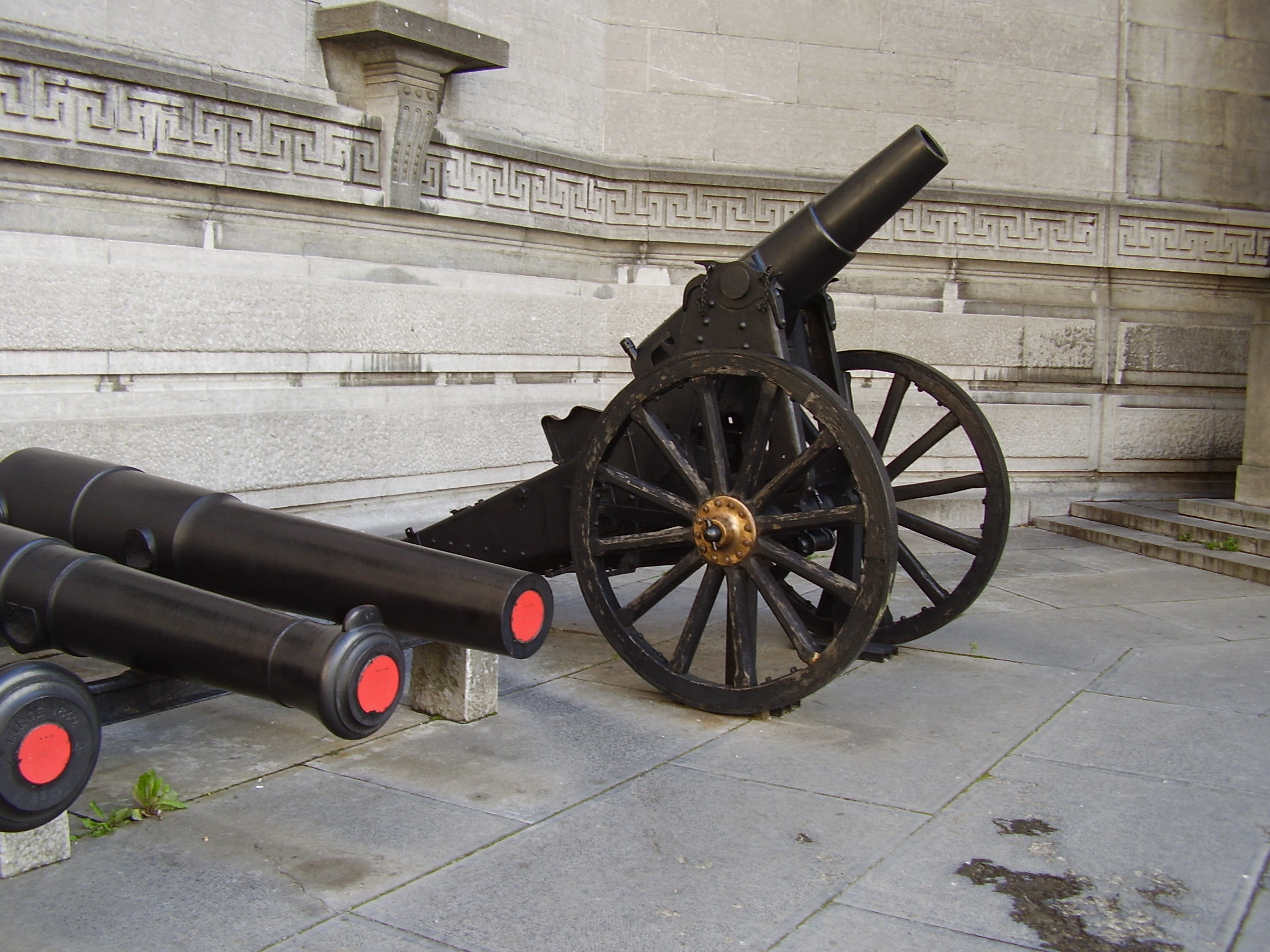 Royal Military Museum Brussels, Musée Royal de l'Armée, Koninklijk Museum van het Leger en de Krijgsgeschiedenis. Obusier de 15c.A. Krupp 1887 sur affût métallique de siège.